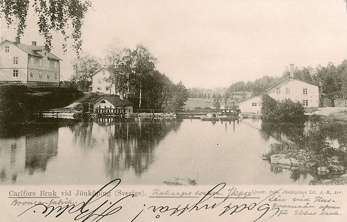 Stensholm vid sekelskiftet.